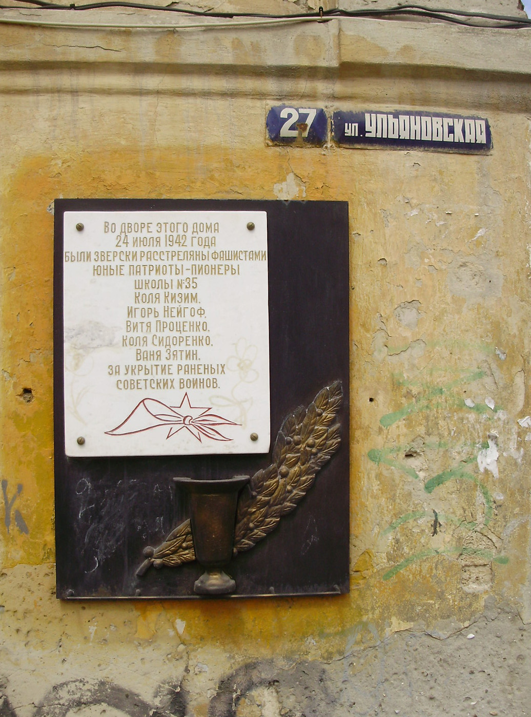 Ростов-на-Дону, составная памятная доска пионерам-патриотам ВОВ, ул. Ульяновская 27 (общий вид).